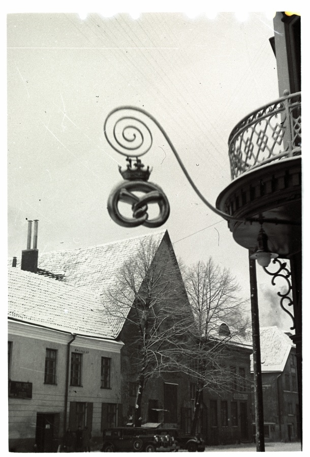 Rippsilt-kringel, endise Steinbergi pagariäri uksel, Laial tänaval. This image on crowdsourcing geotagging platform Ajapaik